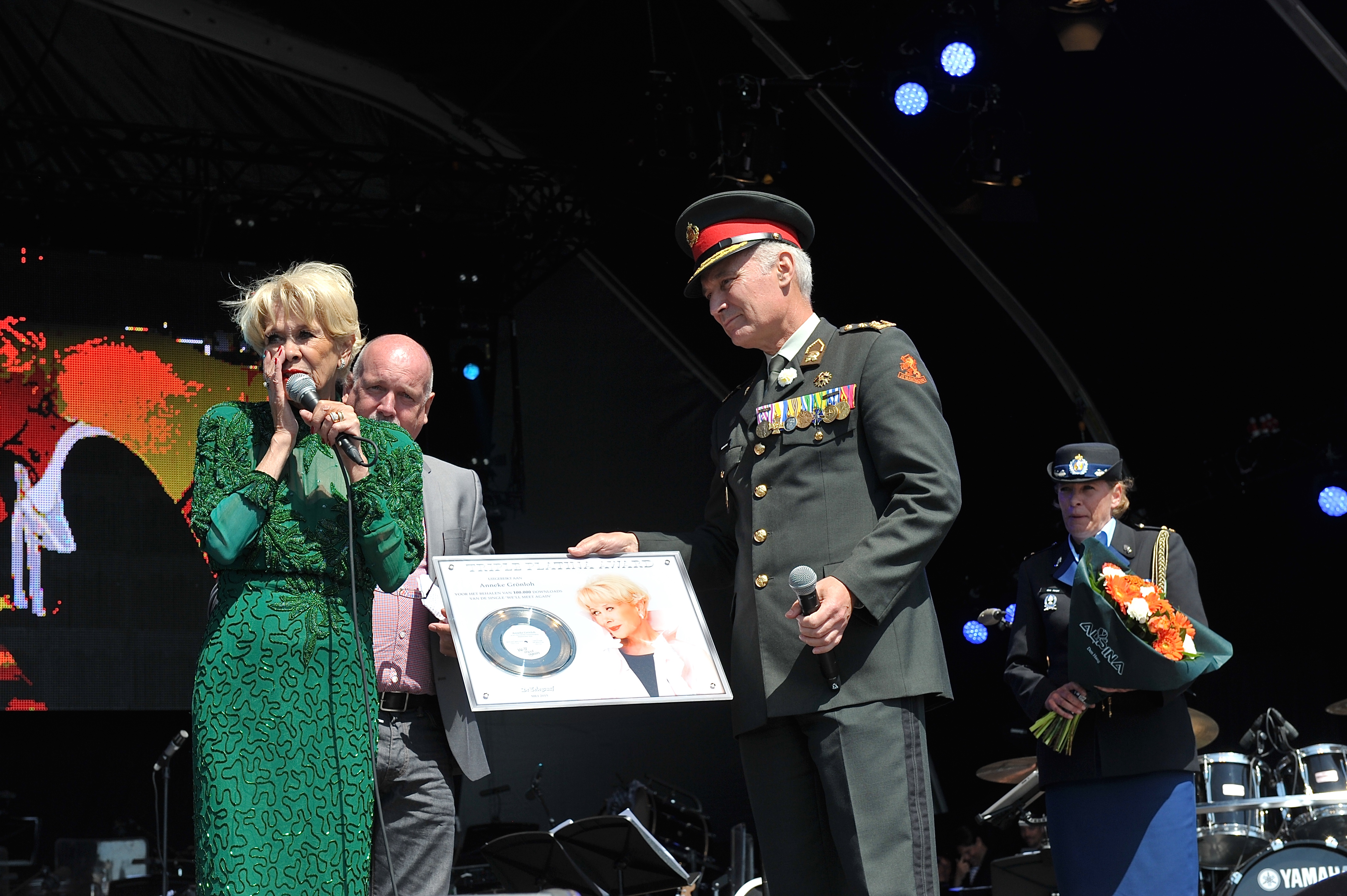 Anneke Gronloh ontvangt van cds Tom Middendorp een triple platina plaat voor de 100.00ste download van haar uitvoering van "We'll Meet Again". Kreetjes van ongeloof.